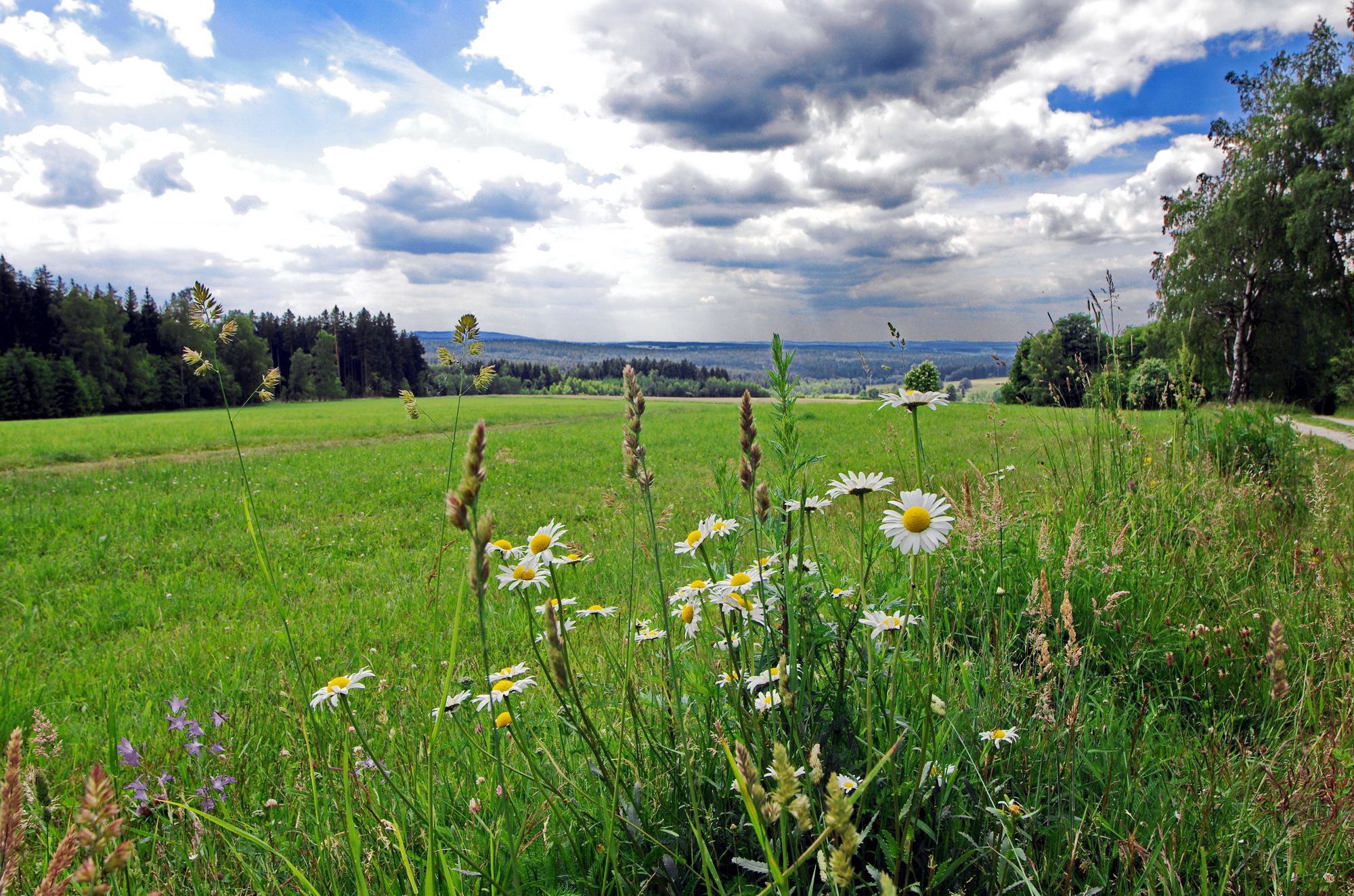 Přírodní park Smrčiny u zaniklé osady Újezd, u česko-německé hranice u Aše, okres Cheb